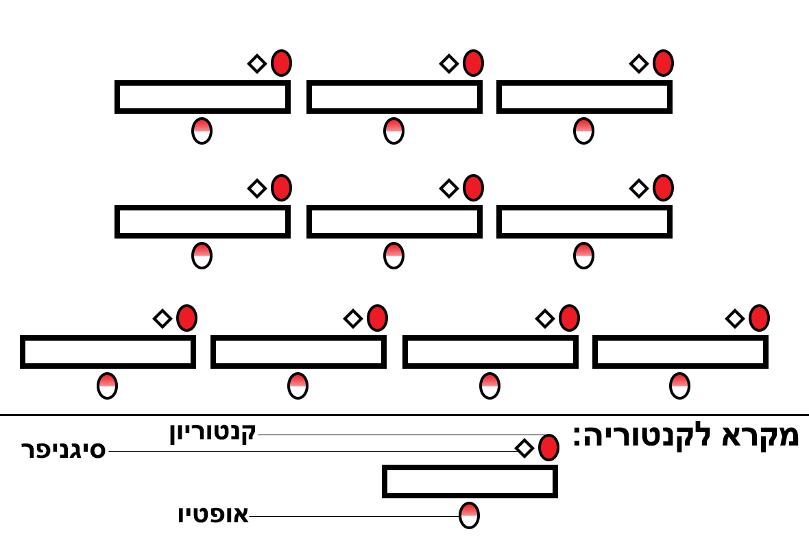 תרשים כיבוש גאליה